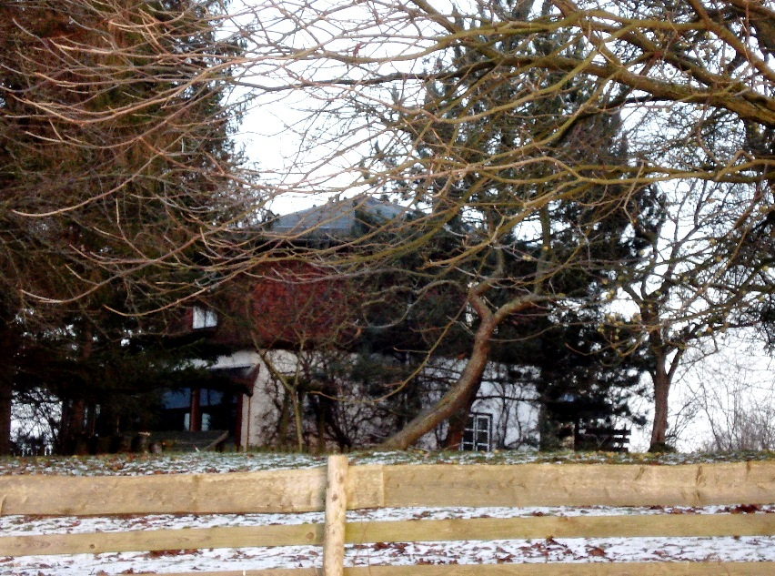 Gebäude des ehem. Zwangsarbeiterlager a. d. Pariner Berg